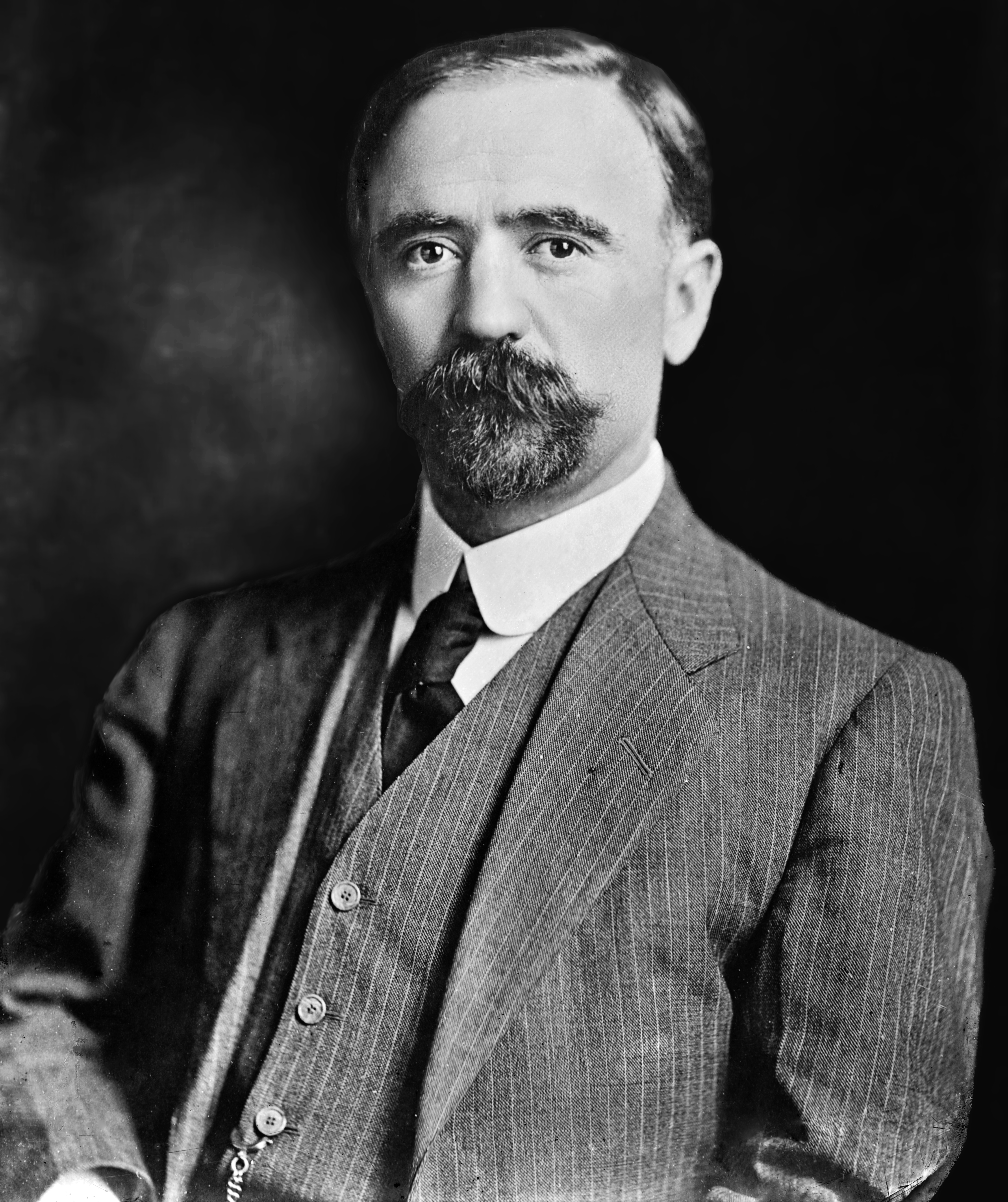 Foto retocada del ex-presidente mexicano Francisco I. Madero.